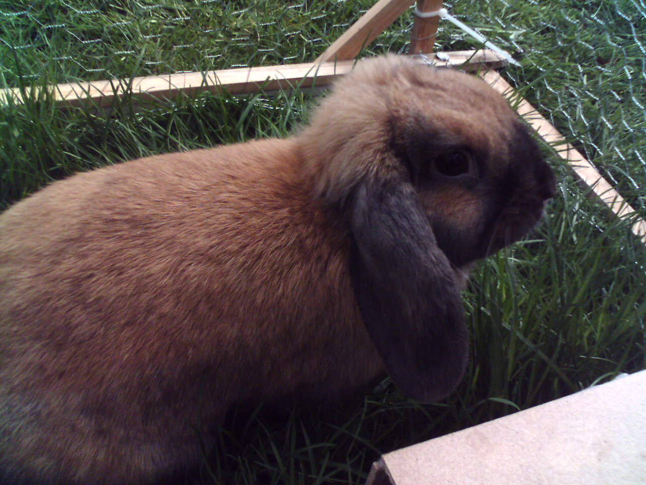 Widderzwerg, thüringerfarben